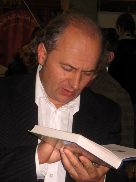 Иван Малкович, укр. литератор